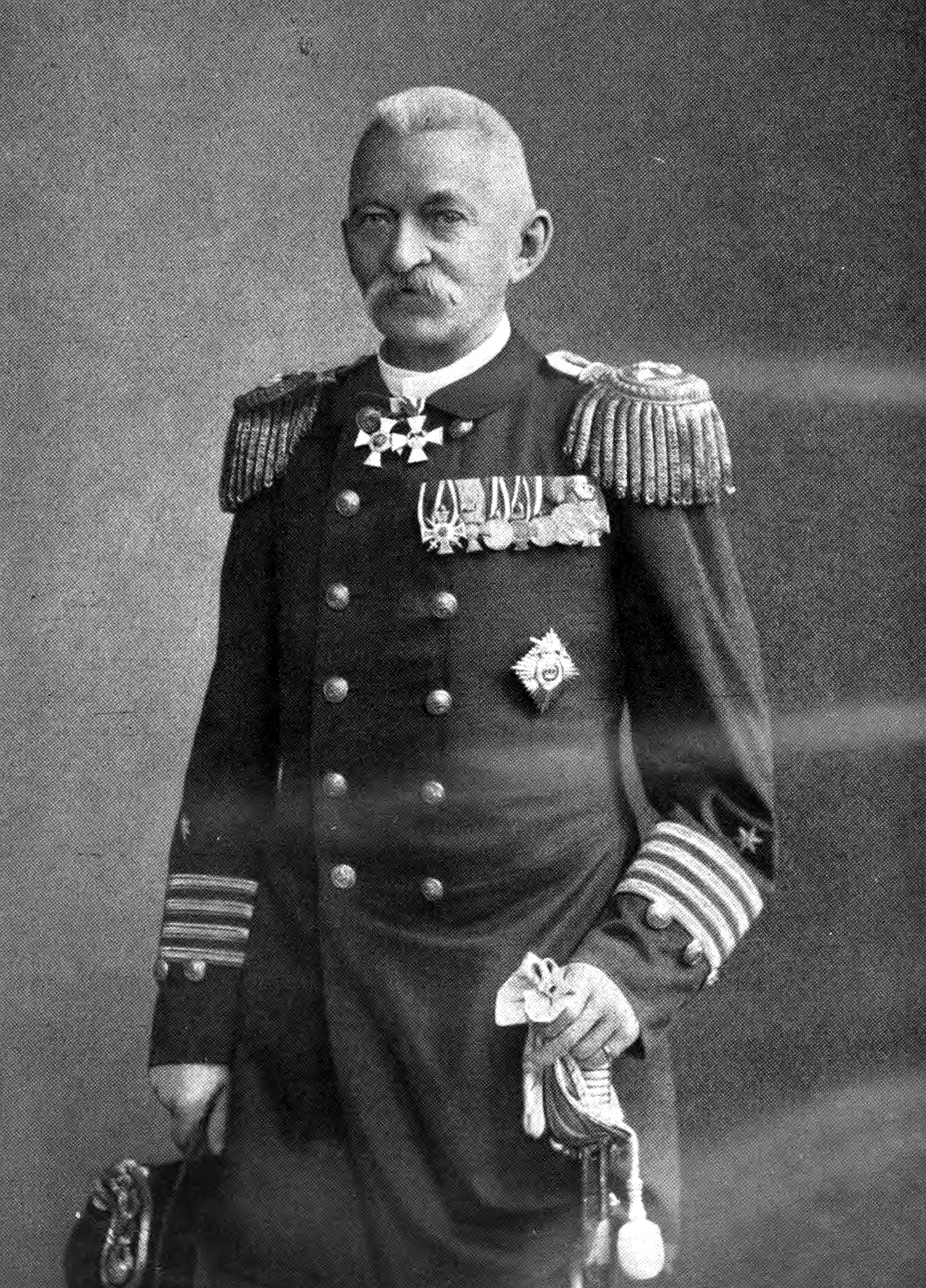 Alfred Stenzel (1832-1906), deutscher Marineoffizier